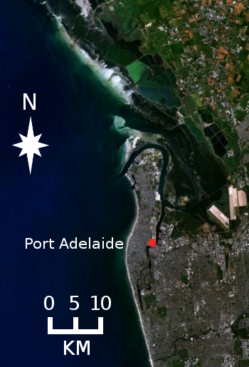 Satellite image over Adelaide Metropolitan area